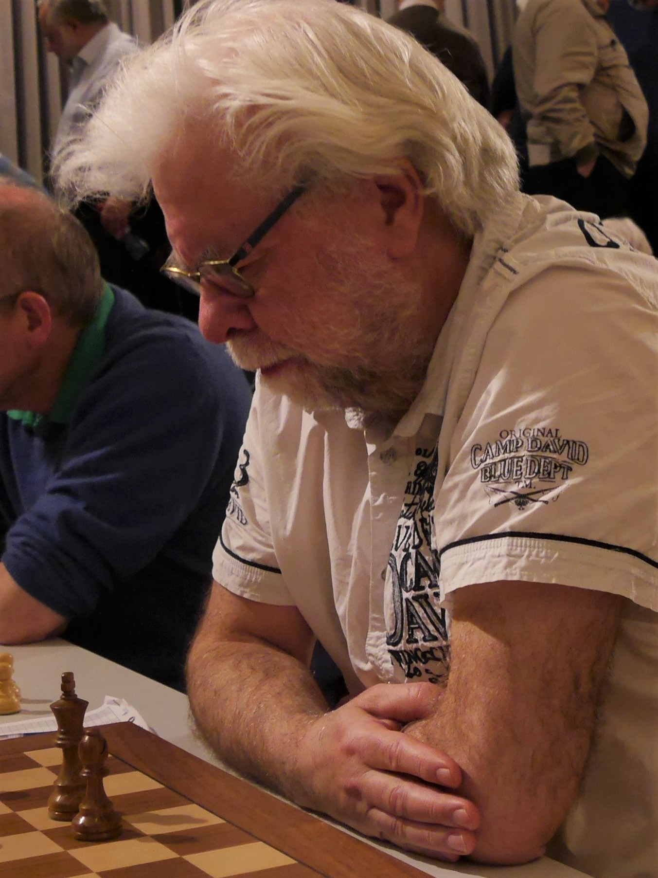 Nils-Gustaf Renman, Schachweltmeisterschaft der Senioren 2016 in Marienbad.